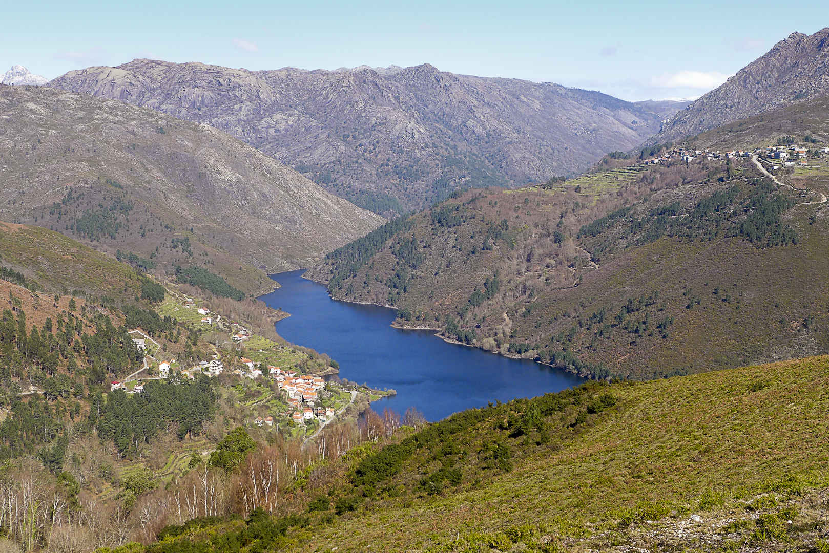 Spain-Rio Lima-P1160751